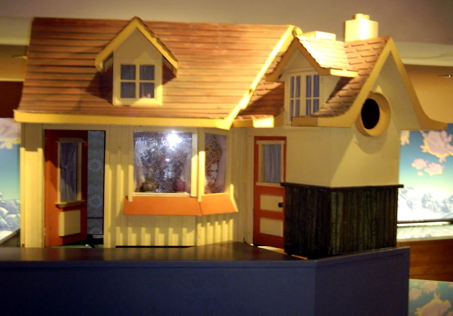 Le Centre musical au Musée de Radio-Canada.